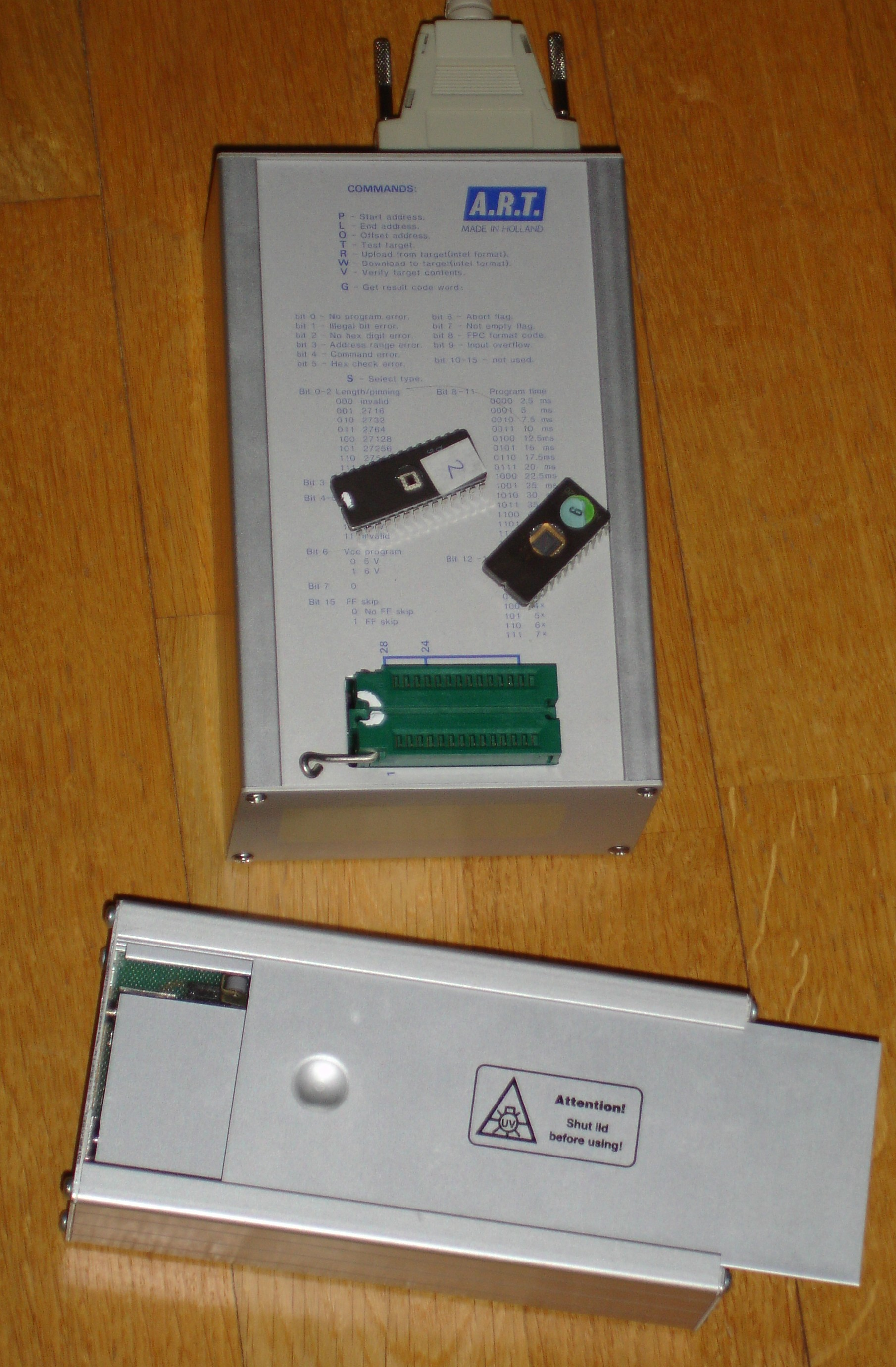 eprommer